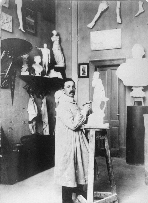 Giovanni Scarabelli nel suo studio di Rosario, Argentina.